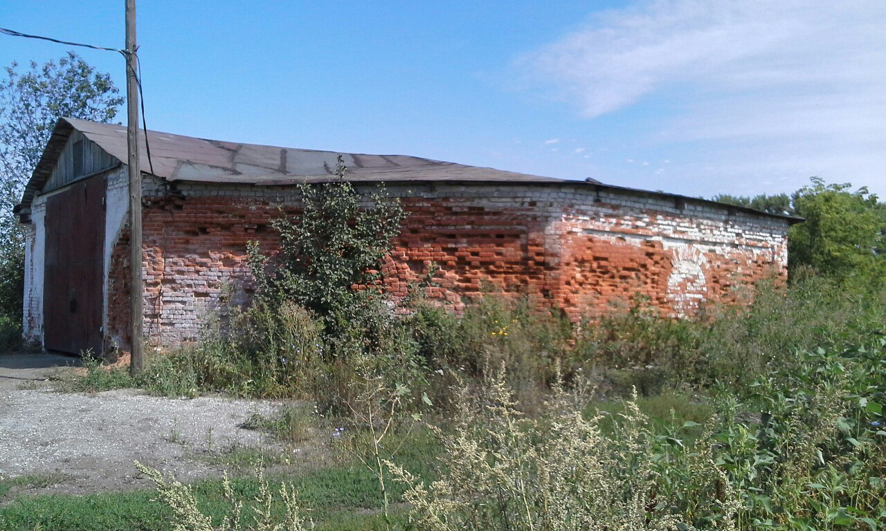 Конюшня Терпигоревых. начало XIX века. Съемка лето 2017 г.